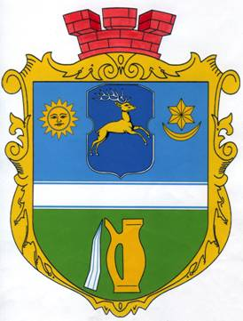 Герб Сатанова: зображення